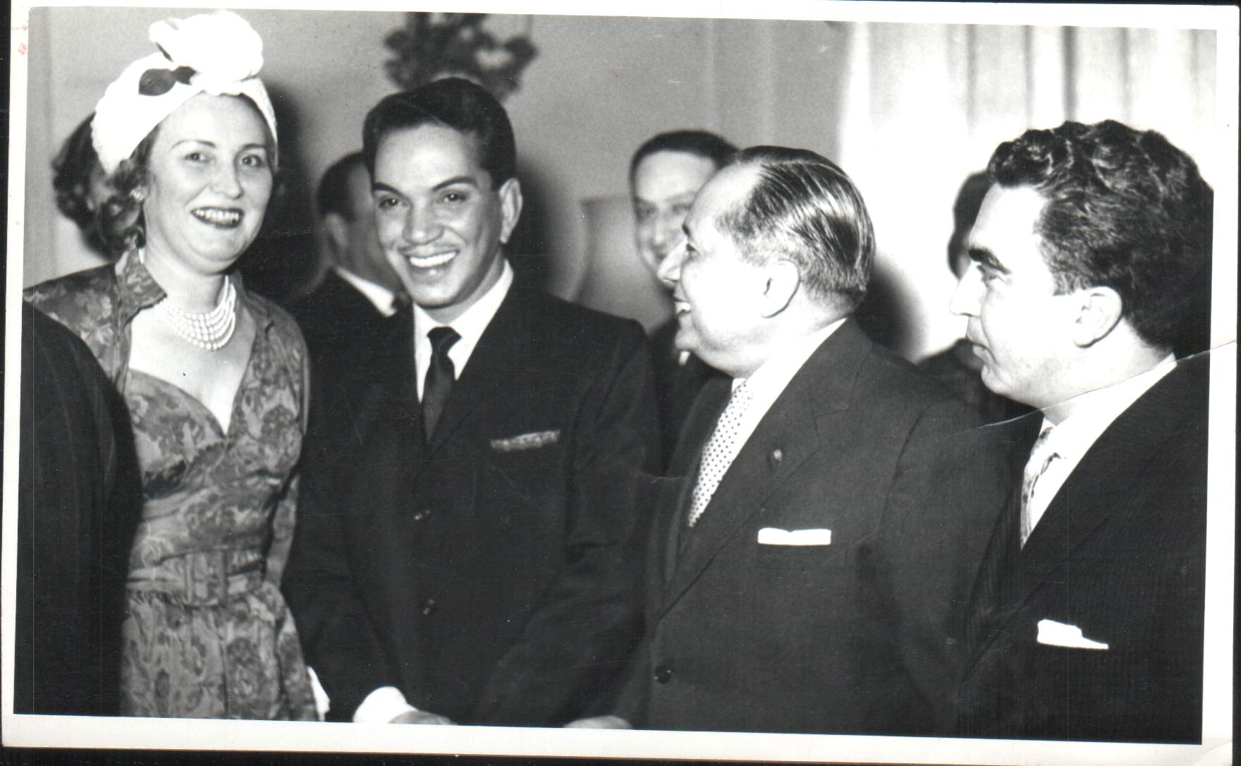 Cantinflas Con el Cónsul Enrique Fernandez Rivera y Su Esposa hildegarda